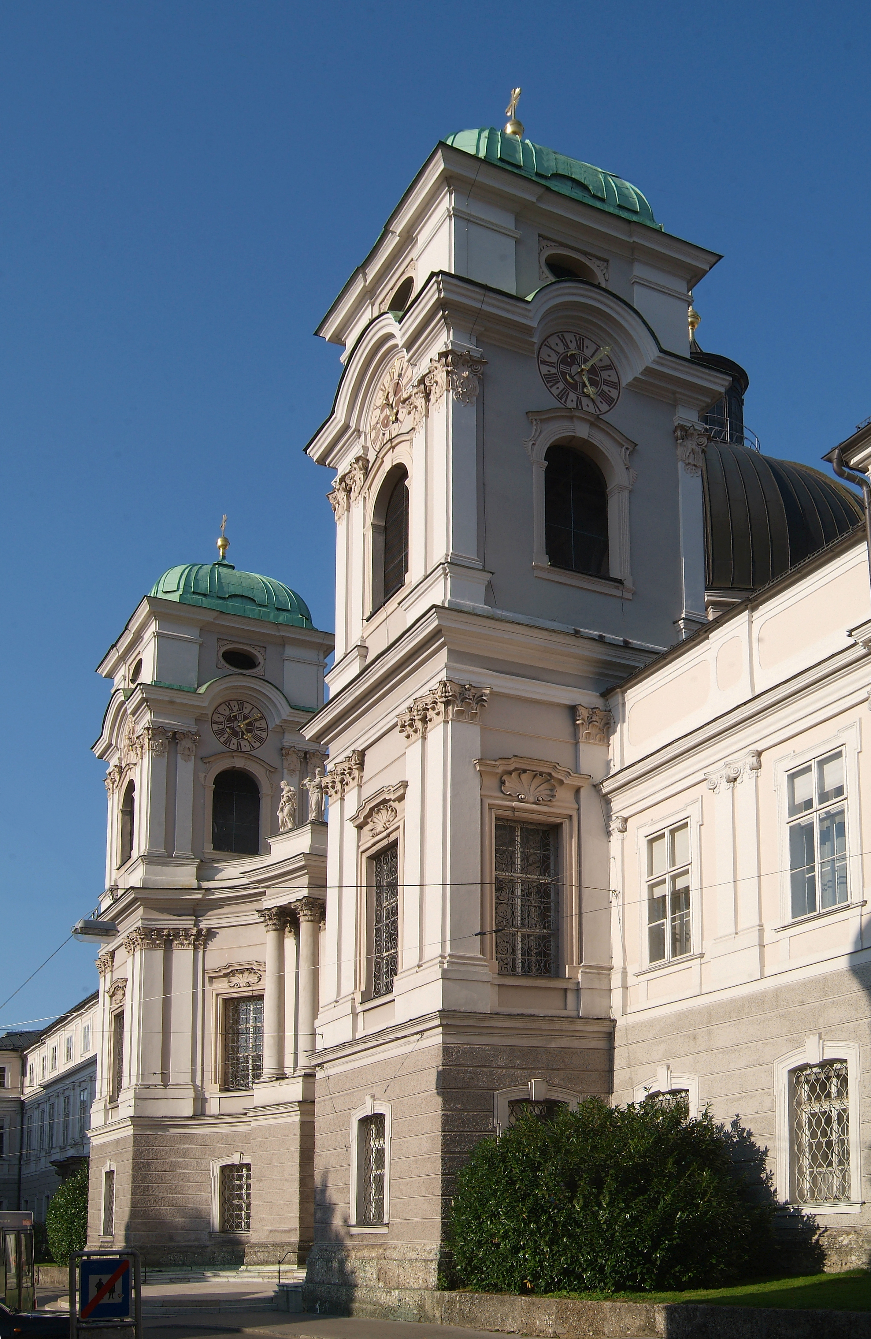 Dreifaltigkeitskirche und Priesterhaus